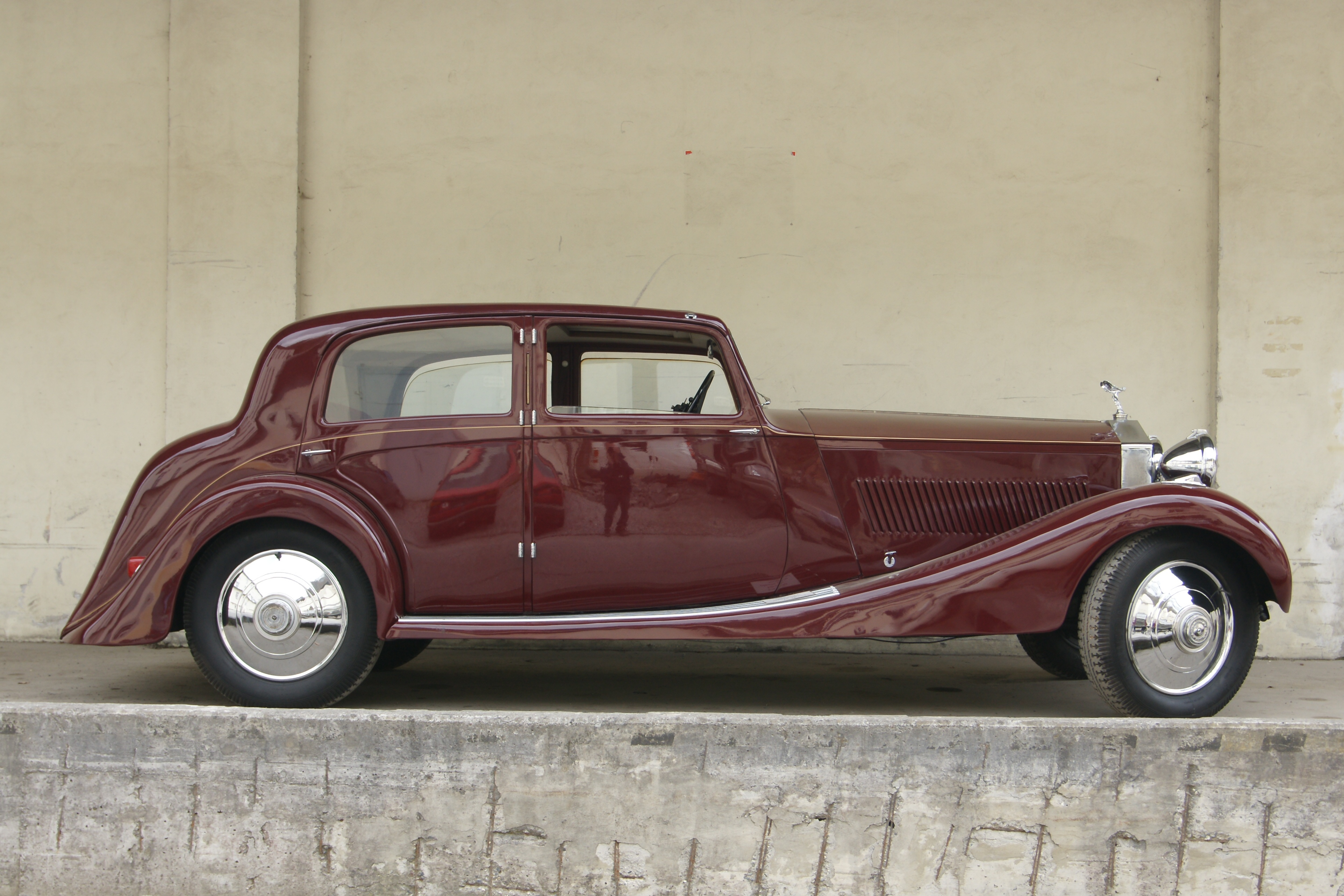 RollsRoyce aus dem Rolls-Royce-Museum im Gütle, Dornbirn, Vorarlberg; ehemals ein Teil der Textilfabrik F.M.Hämmerle.